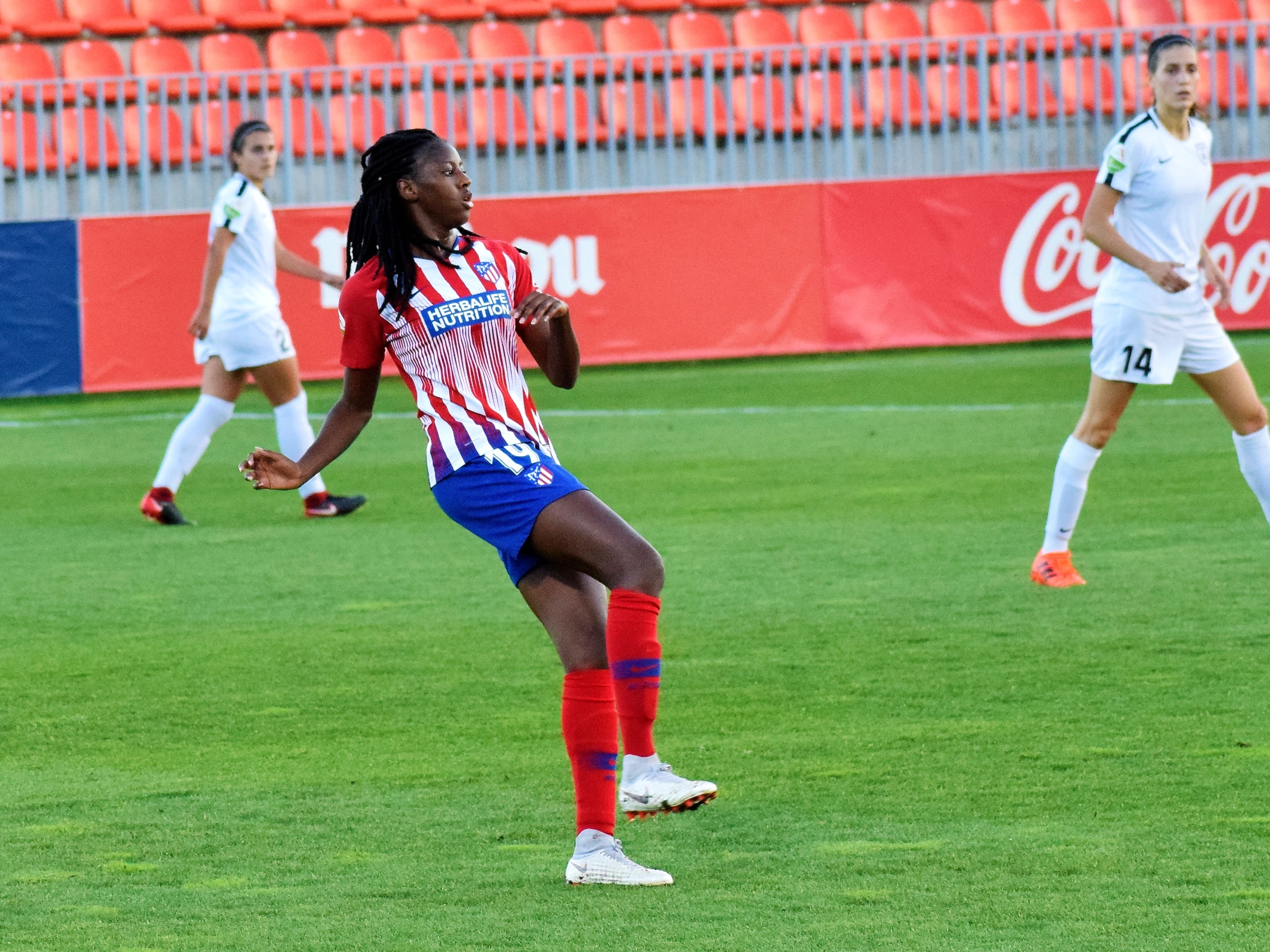 Aissa Tounkara jugando con el Atlético de Madrid